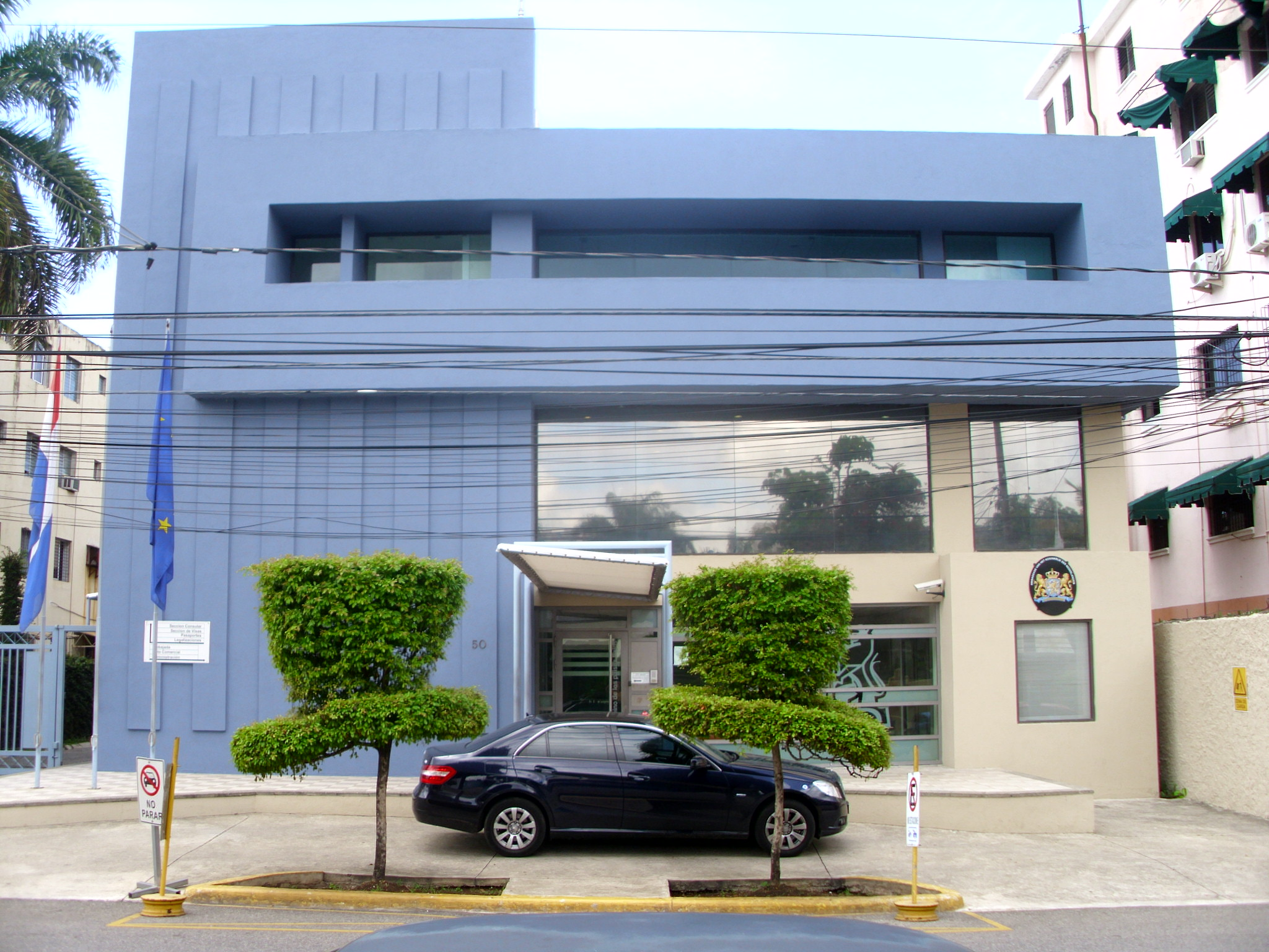 Nederlandse ambassade in Santo Domingo, Dominicaanse Republiek